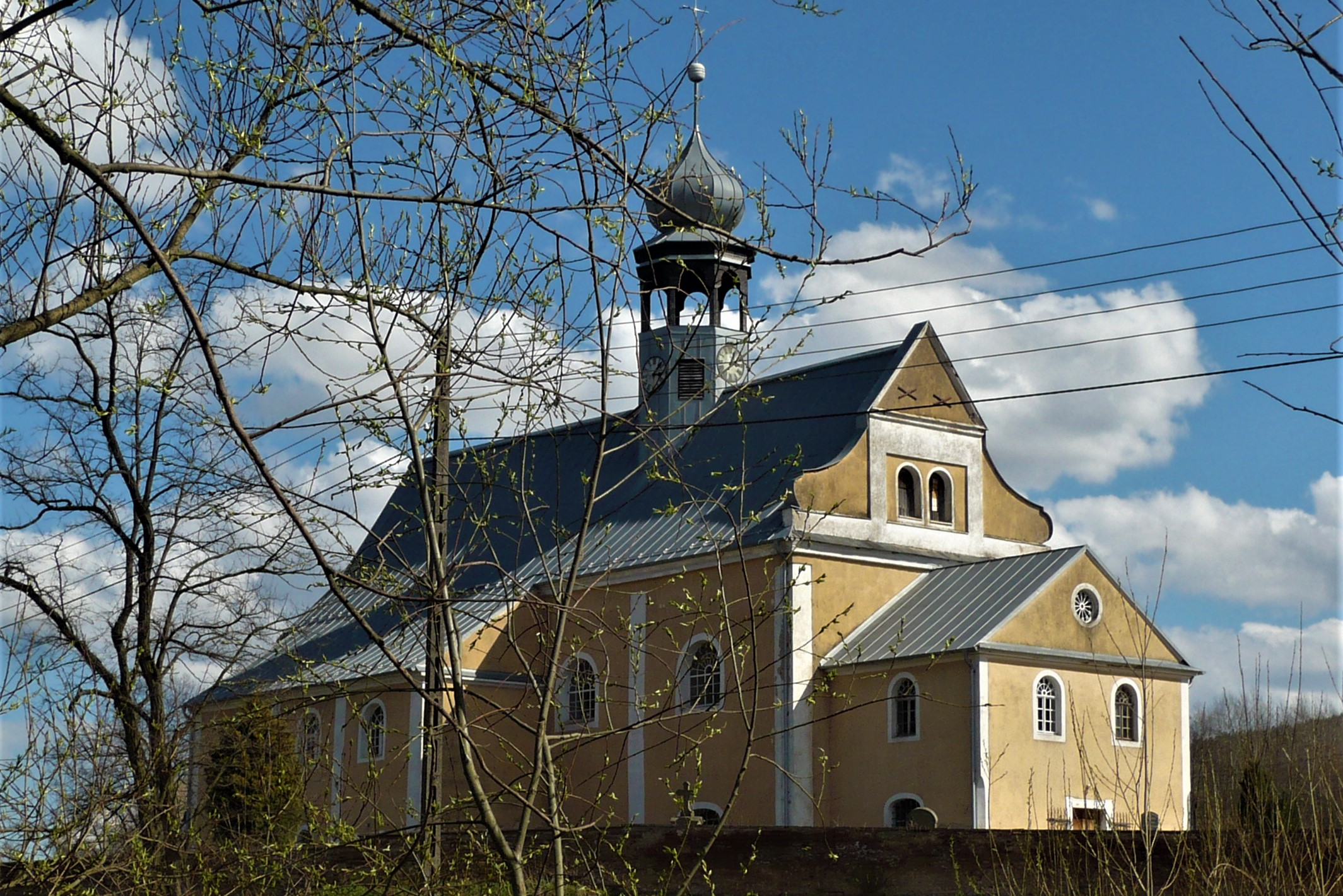 Tłumaczów - rzymskokatolicki kościół filialny pw. śś. Piotra i Pawła, XVIII, 2 poł. XIX